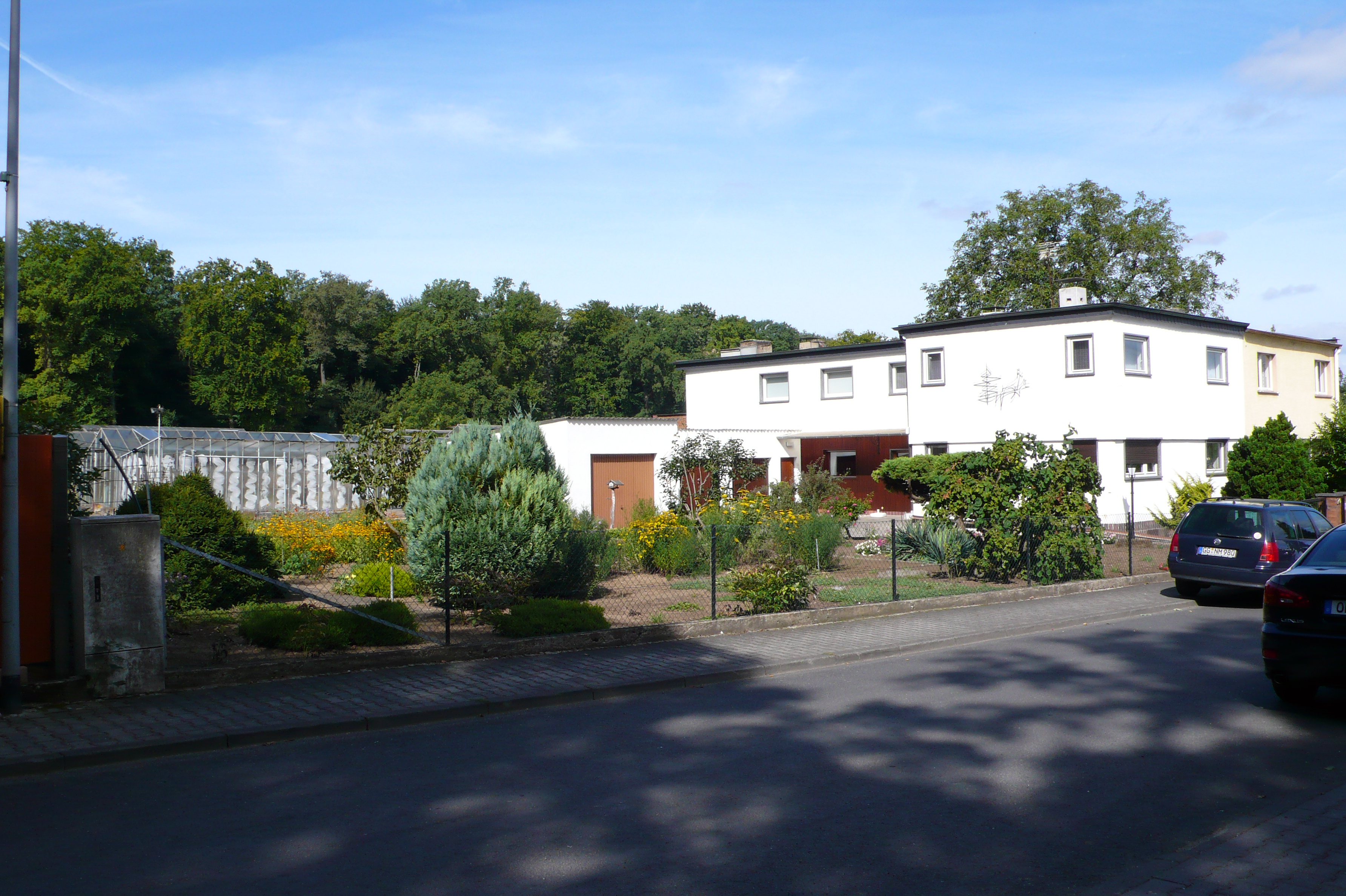 Gärtnereisiedlung "Im Teller" von Ernst May aus dem Jahr 1927 von Süden